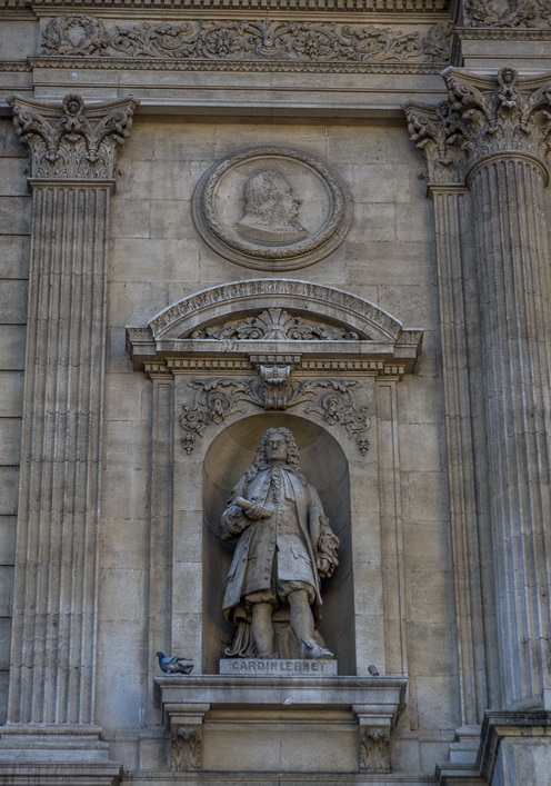 statue de Pierre-Cardin Le Bret sur la façade de la préfecture de Marseille.